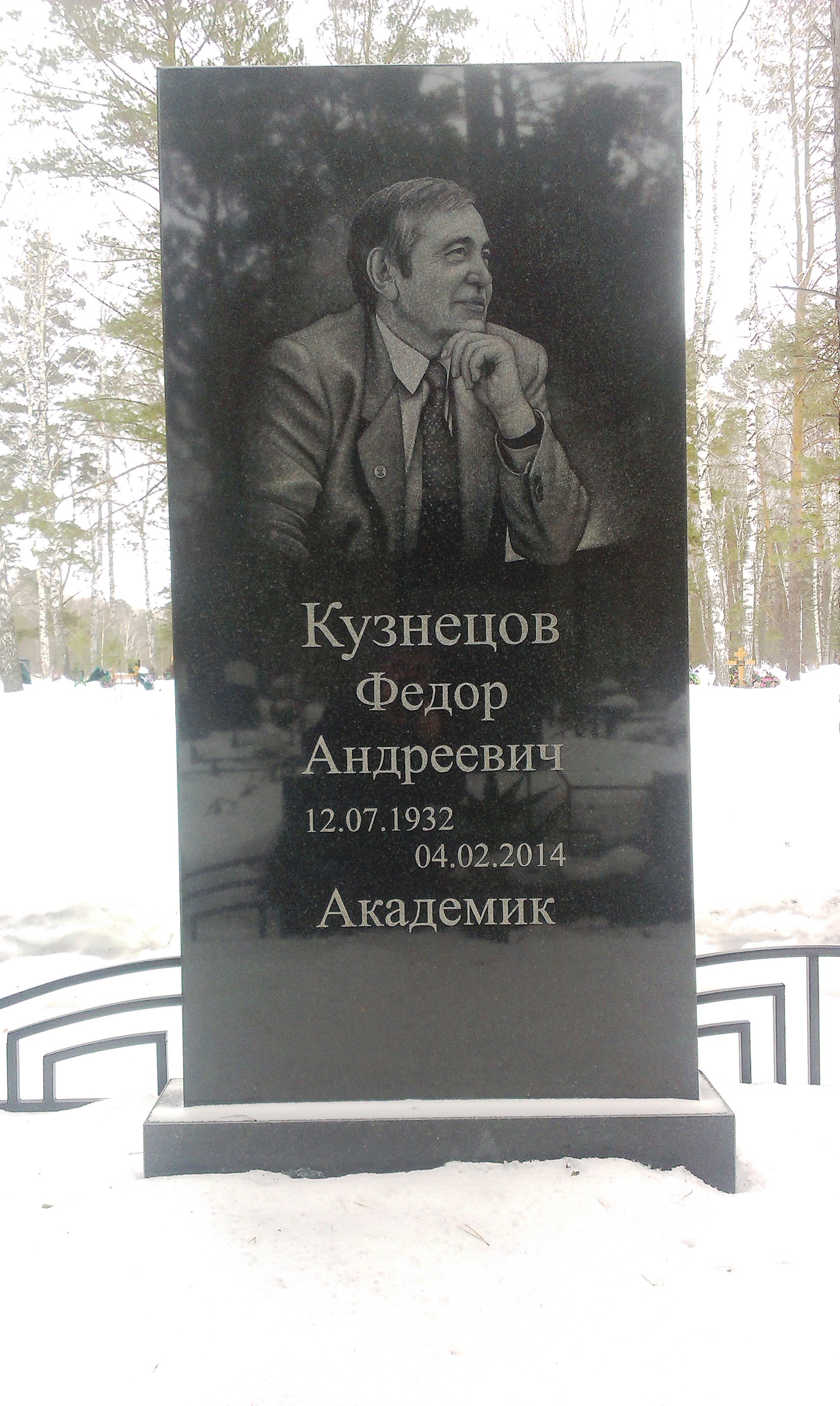 Южное кладбище в Новосибирске